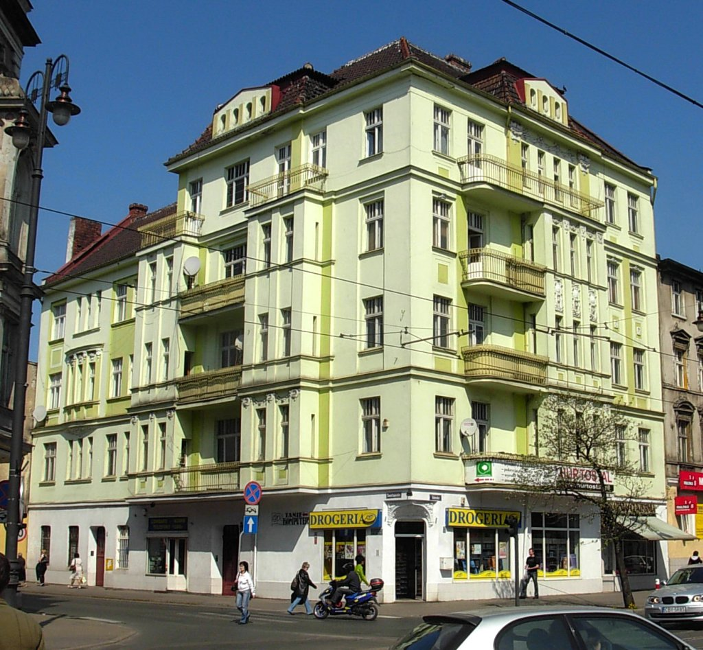 Kamienica ul. Świętojańska 2 róg Gdańskiej w Bydgoszczy